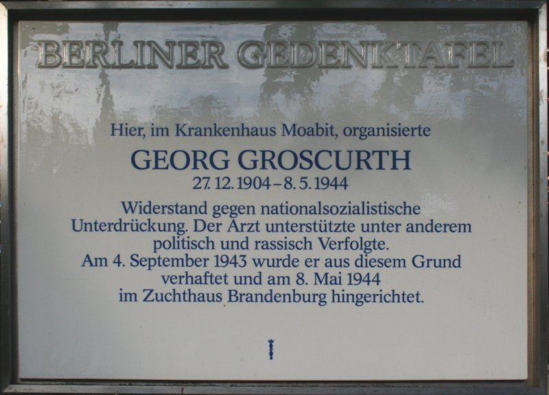 Berliner Gedenktafel für den Arzt und Widerstandskämpfer Georg Groscurth am Eingang zum ehemaligen Krankenhaus Moabit, Turmstraße 22. (Foto wurde entzerrt, beschnitten und farbkorrigiert)